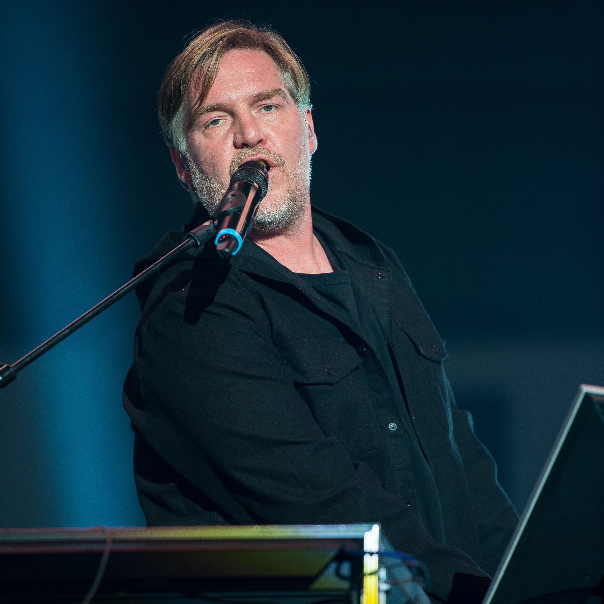 And.Y,And.Ypsilon,Andreas Rieke,Andy Y,Arena Nürnberger Versicherungen,Concertbüro Franken,Die fantastischen Vier,Fanta4,Konzert,Livekonzert,Livemusik,Musik,Rekord-Tour